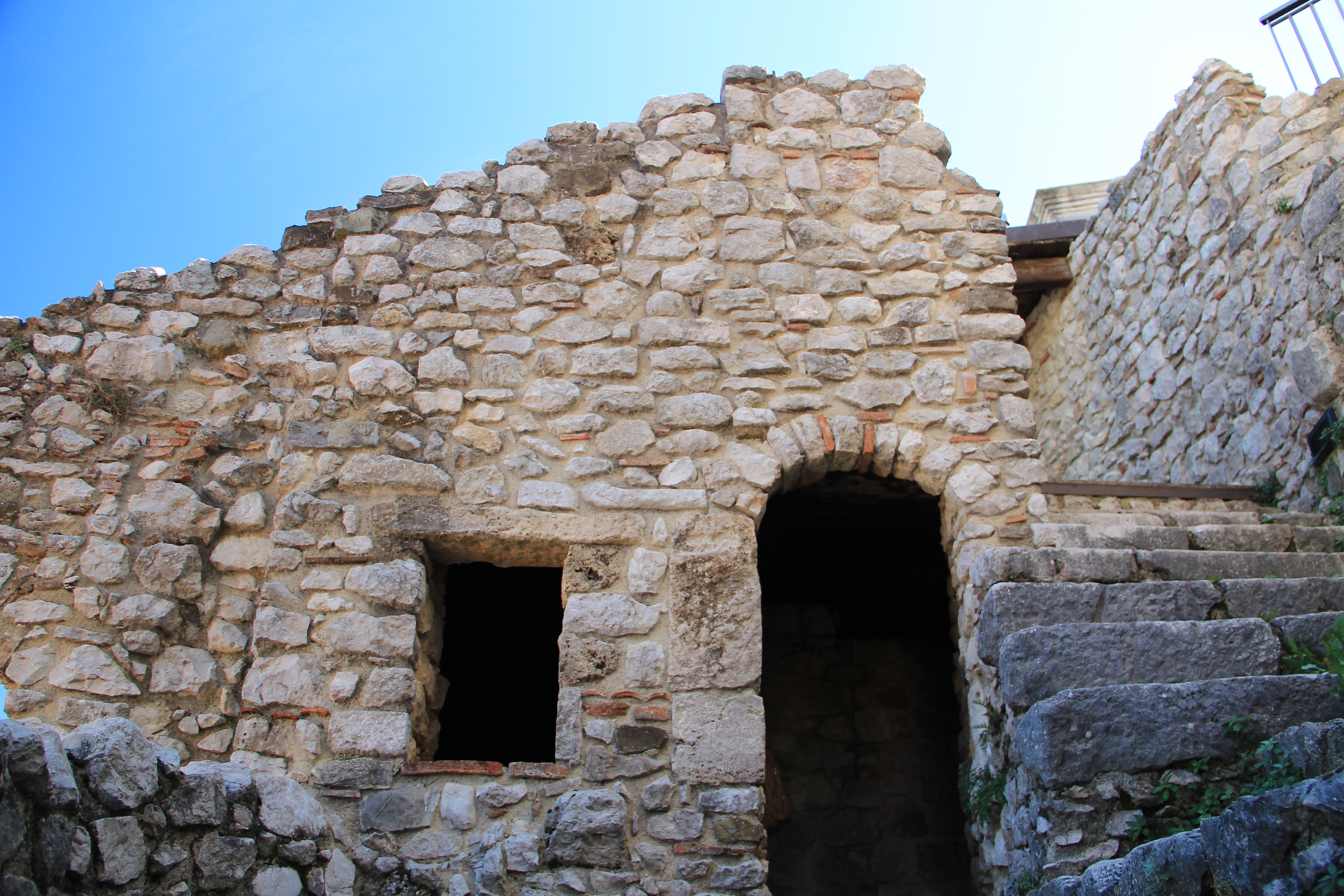 Parco archeologico urbano di Volcei This is a photo of a monument which is part of cultural heritage of Italy.